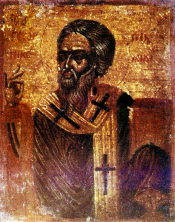 Святитель Георгий Никомидийский. Икона. Греция. XVI век. Византийский музей. Афины.